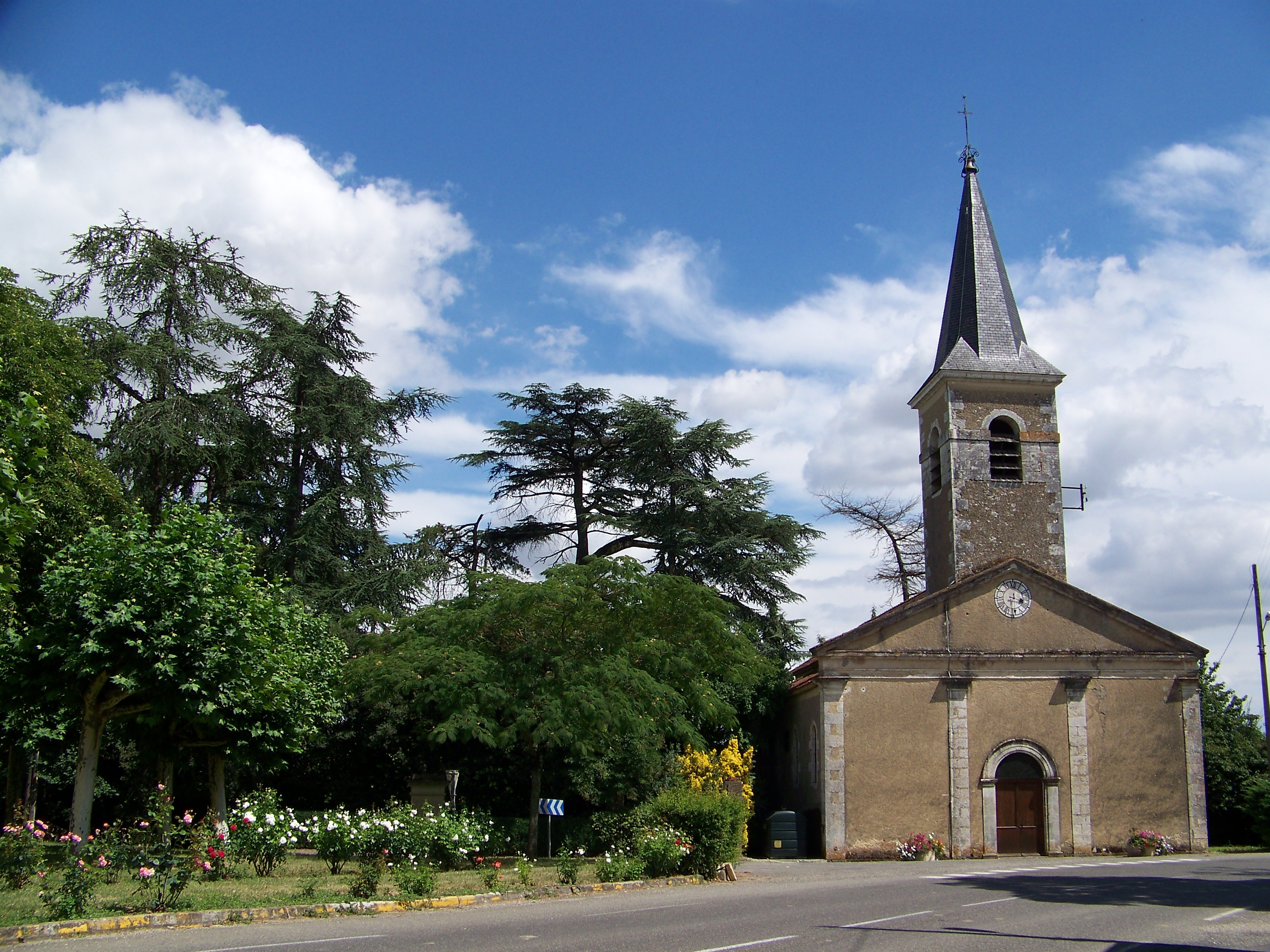 Ayguetinte, l'église